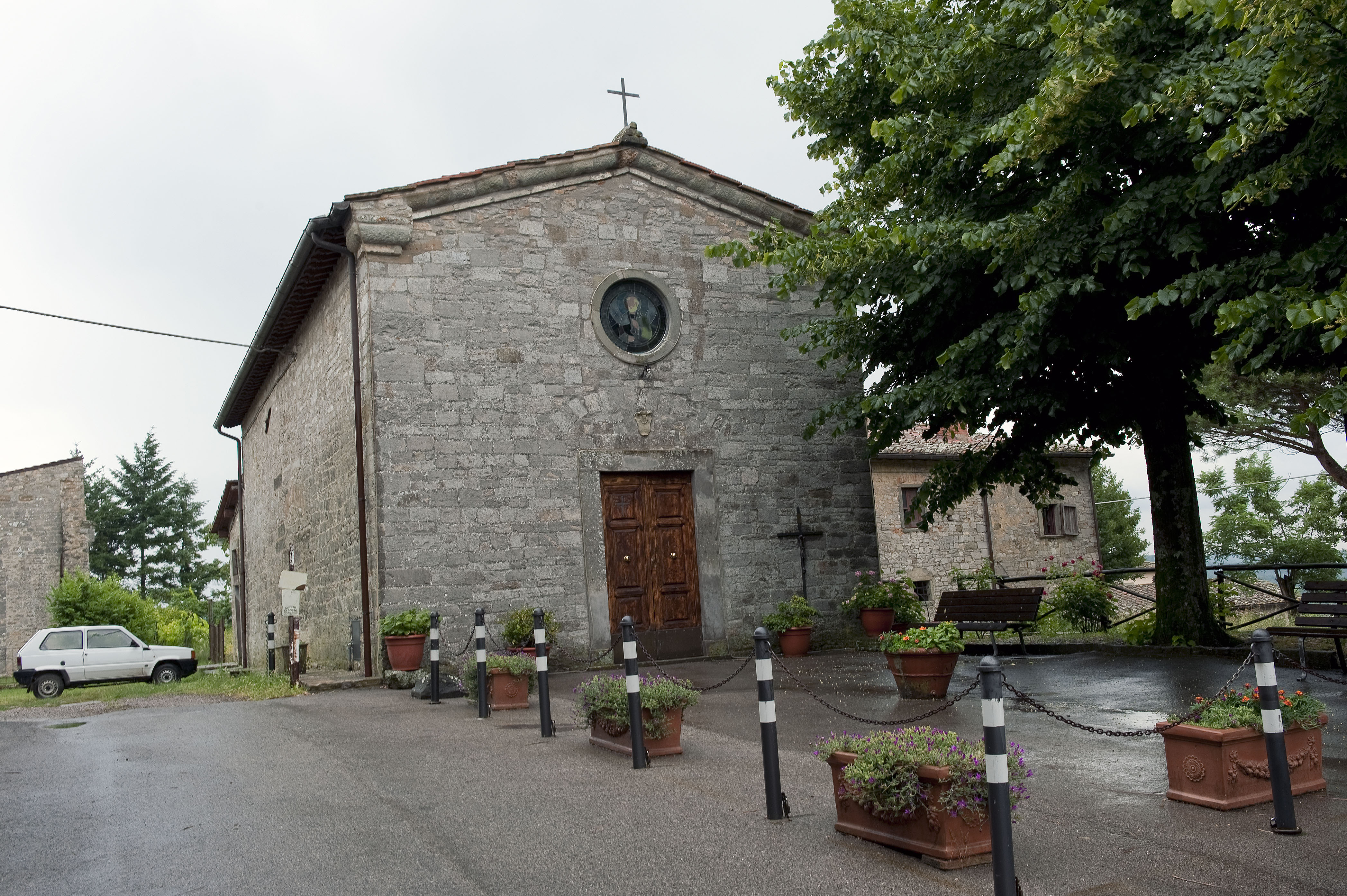 chiesa di san pietro a badia a montemuro, Radda in chianti